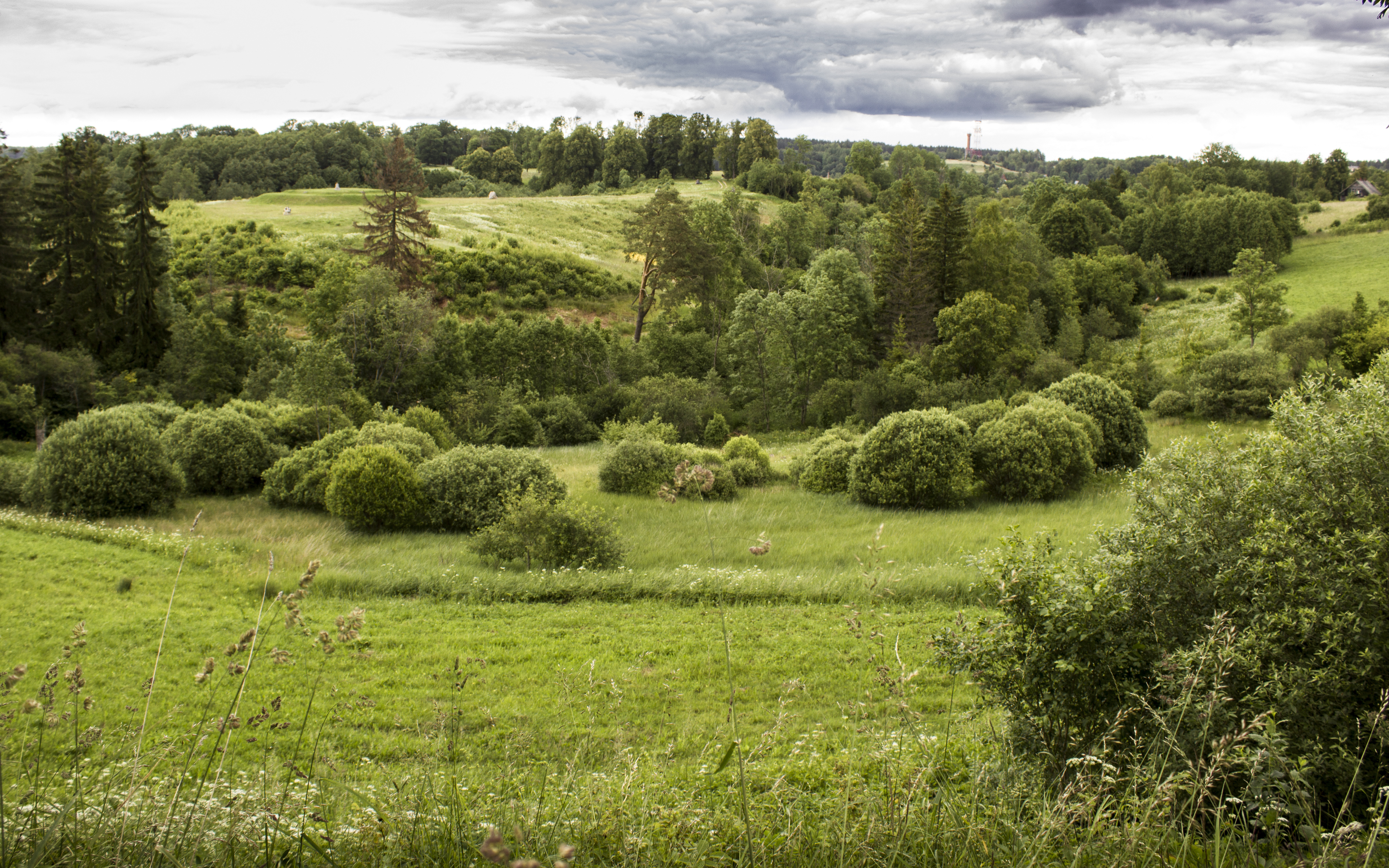 Pedvāle open air museum